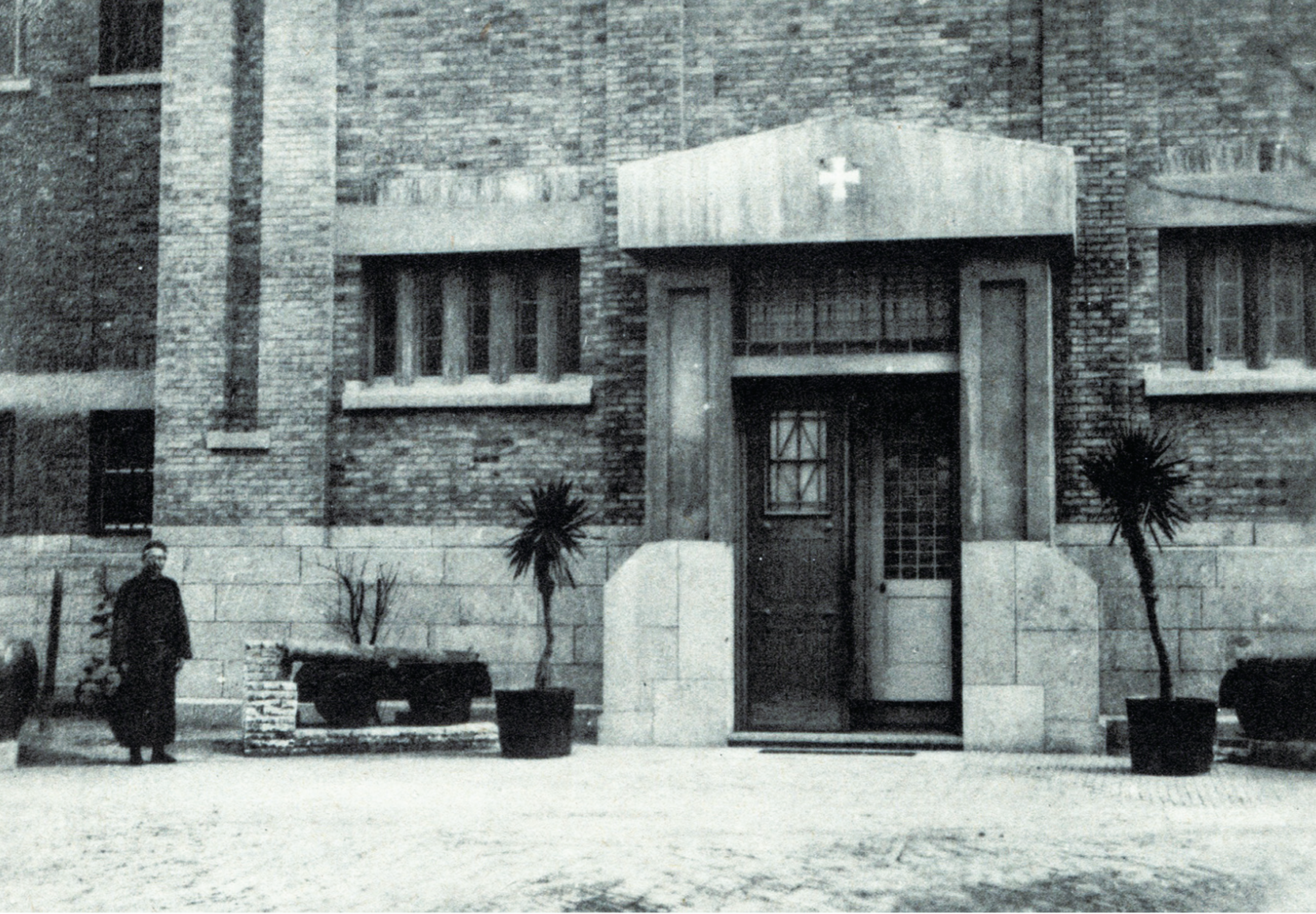 中文（中国大陆）: 北疆博物院陈列室入口